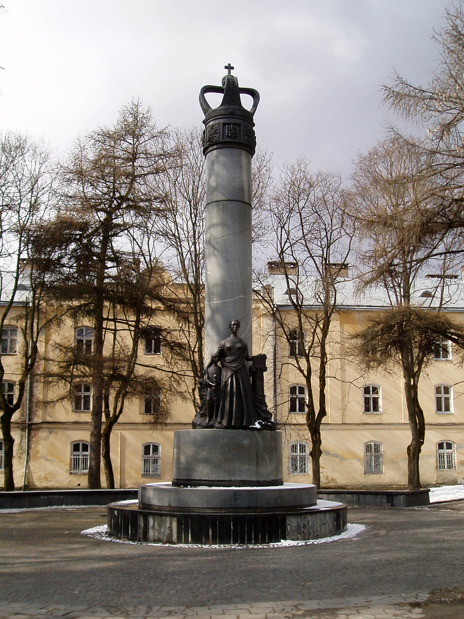 Пам'ятник «Просвіті» у Львові. Скульптор Василь Ярич, 1993 рік.